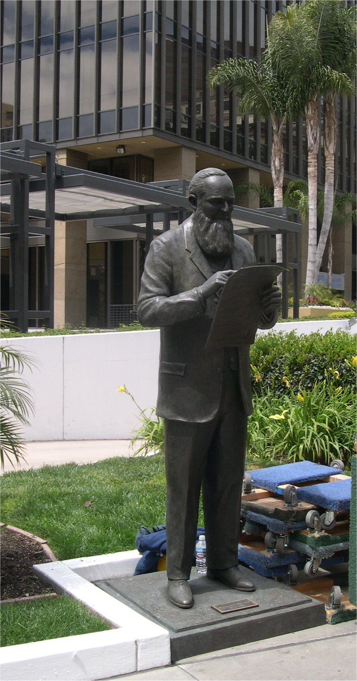 Alonzo Horton statue